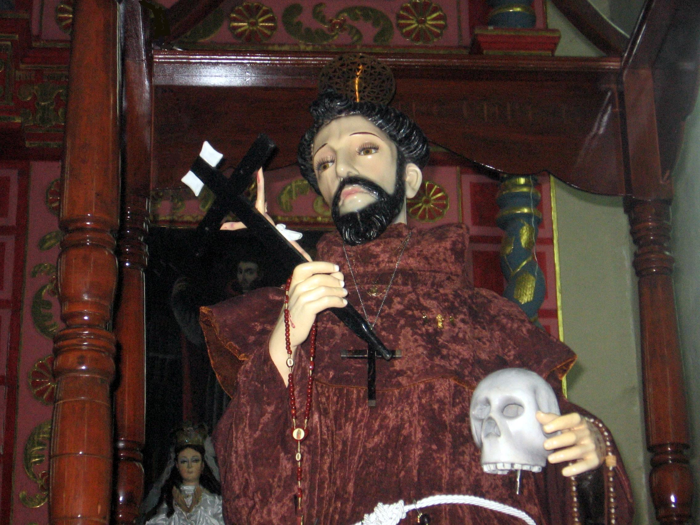 Imagen San Francisco de Asis de Telchac Pueblo